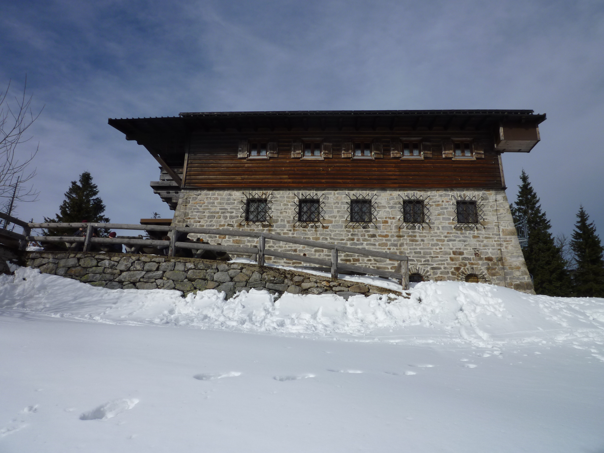 Blick vom Winterwanderweg auf das Lusen-Schutzhaus; Nationalpark Bayerischer Wald.